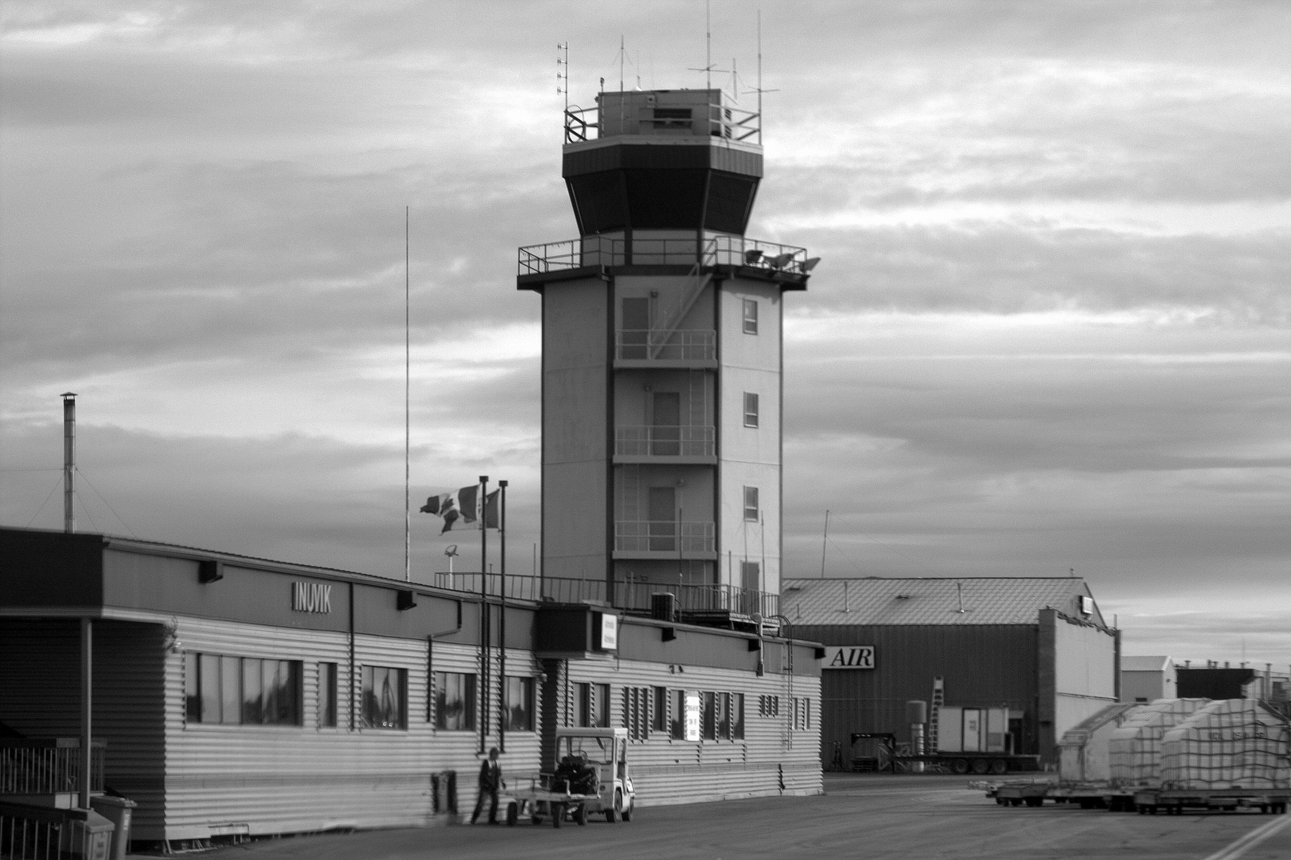 Inuvik, NT